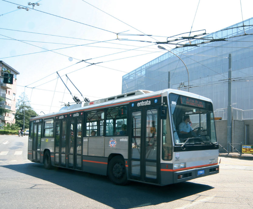 Filovia nei pressi del megacine di La Spezia